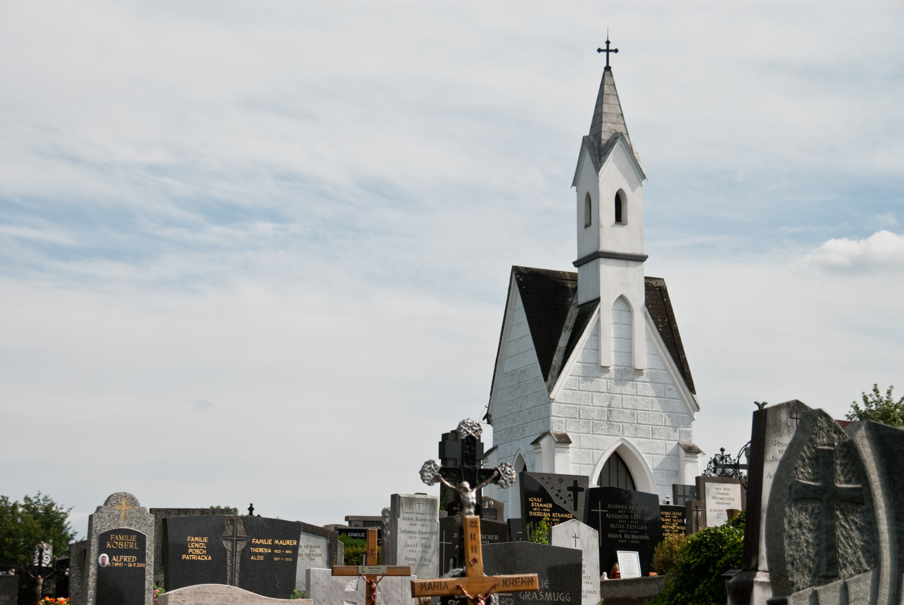 Gruftkapelle Fam. Lehr